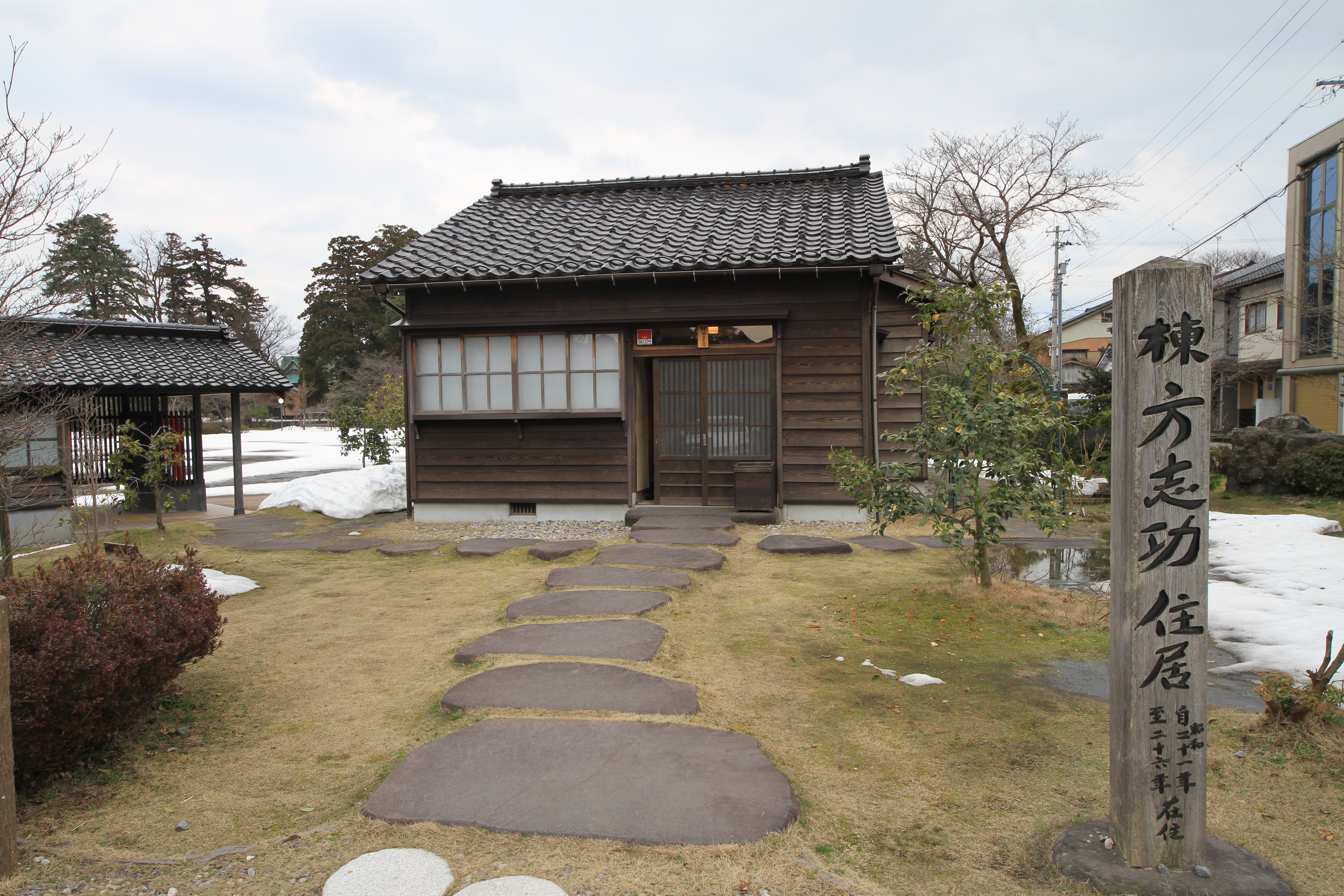 Fukumitsu, Nanto, Toyama Prefecture 939-1610, Japan